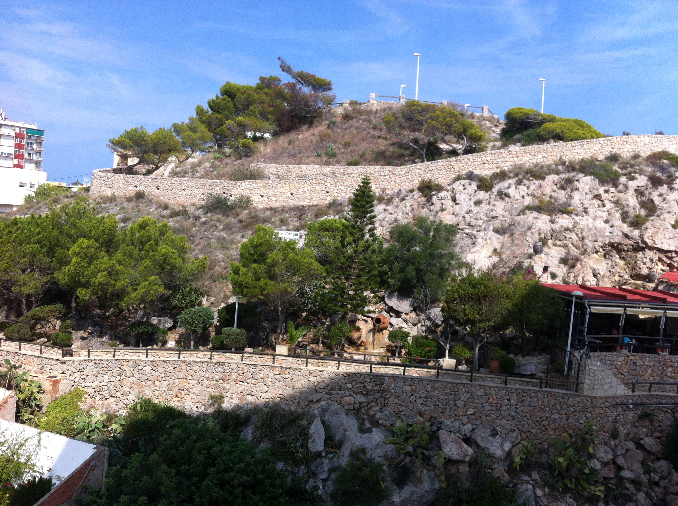 Colina de los acantilados del Faro de Cullera donde estaba la torre del cabo del siglo XVI. En su parte inferior se encuentra la cueva Dragut.